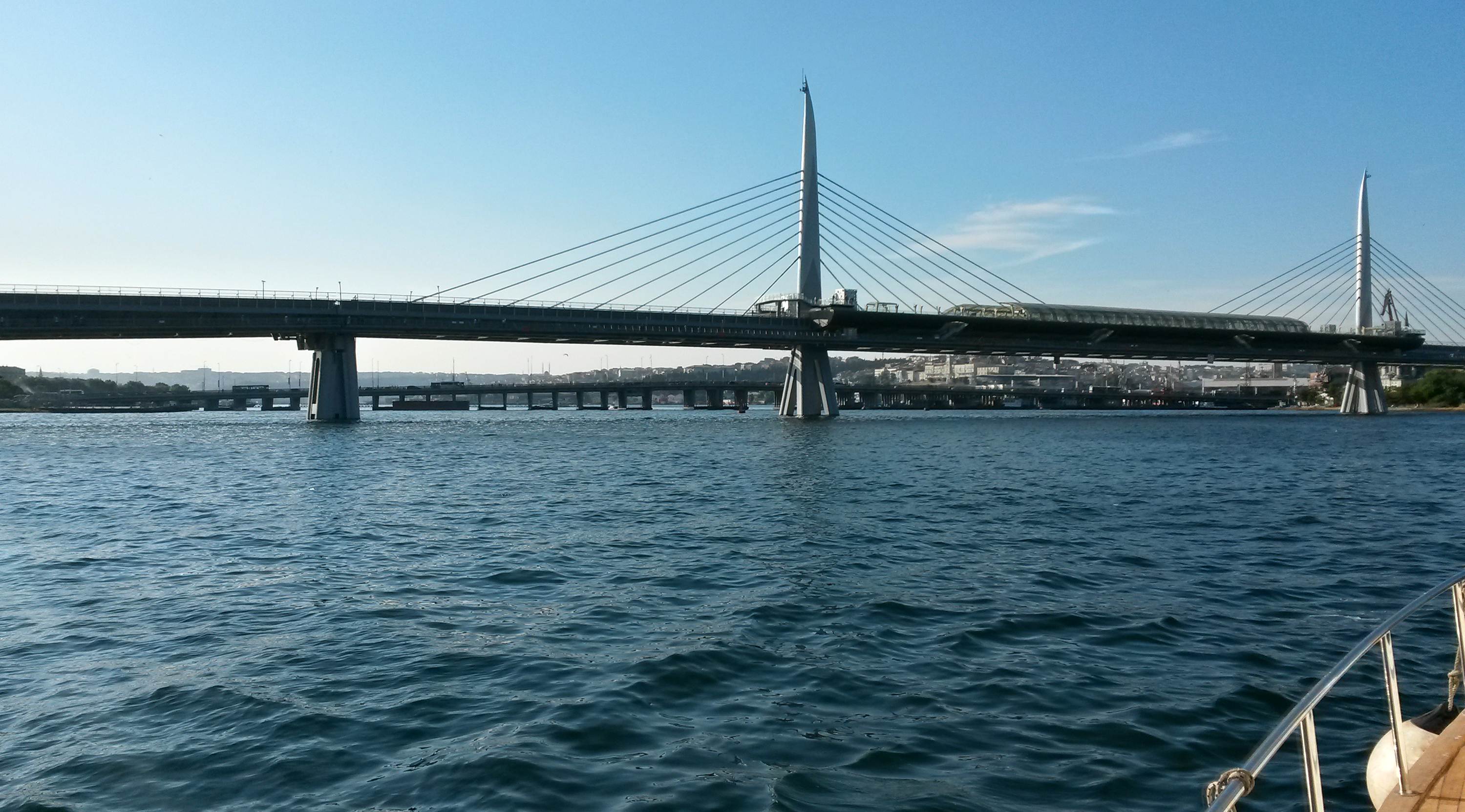 [M2] Metro Köprüsü